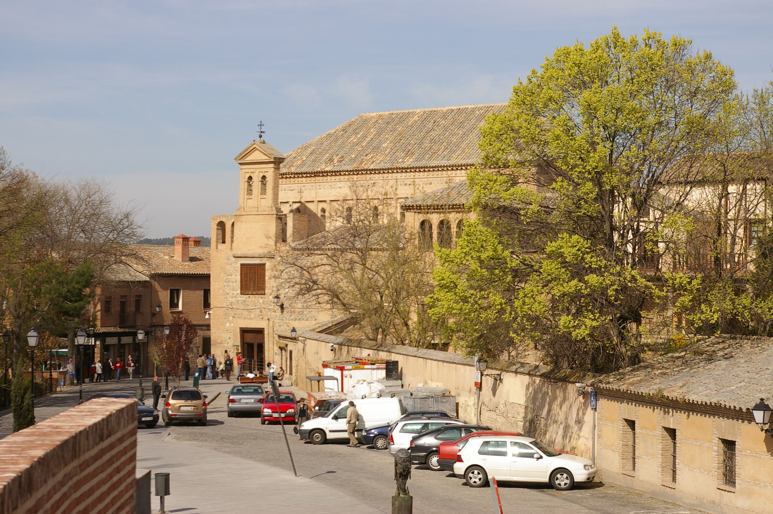 Synagogue el Transito de Tolède, aujourd'hui musée, naguère église el Transito par référence à la Dormition de la Vierge